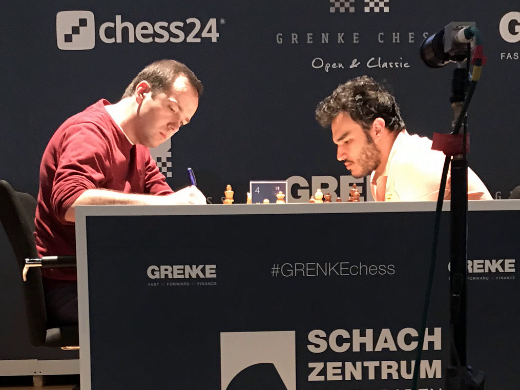 Arturs Neiksans und M.amin Tabatabaei, Runde 8 der Grenke Chess Open 2019 in Karlsruhe.